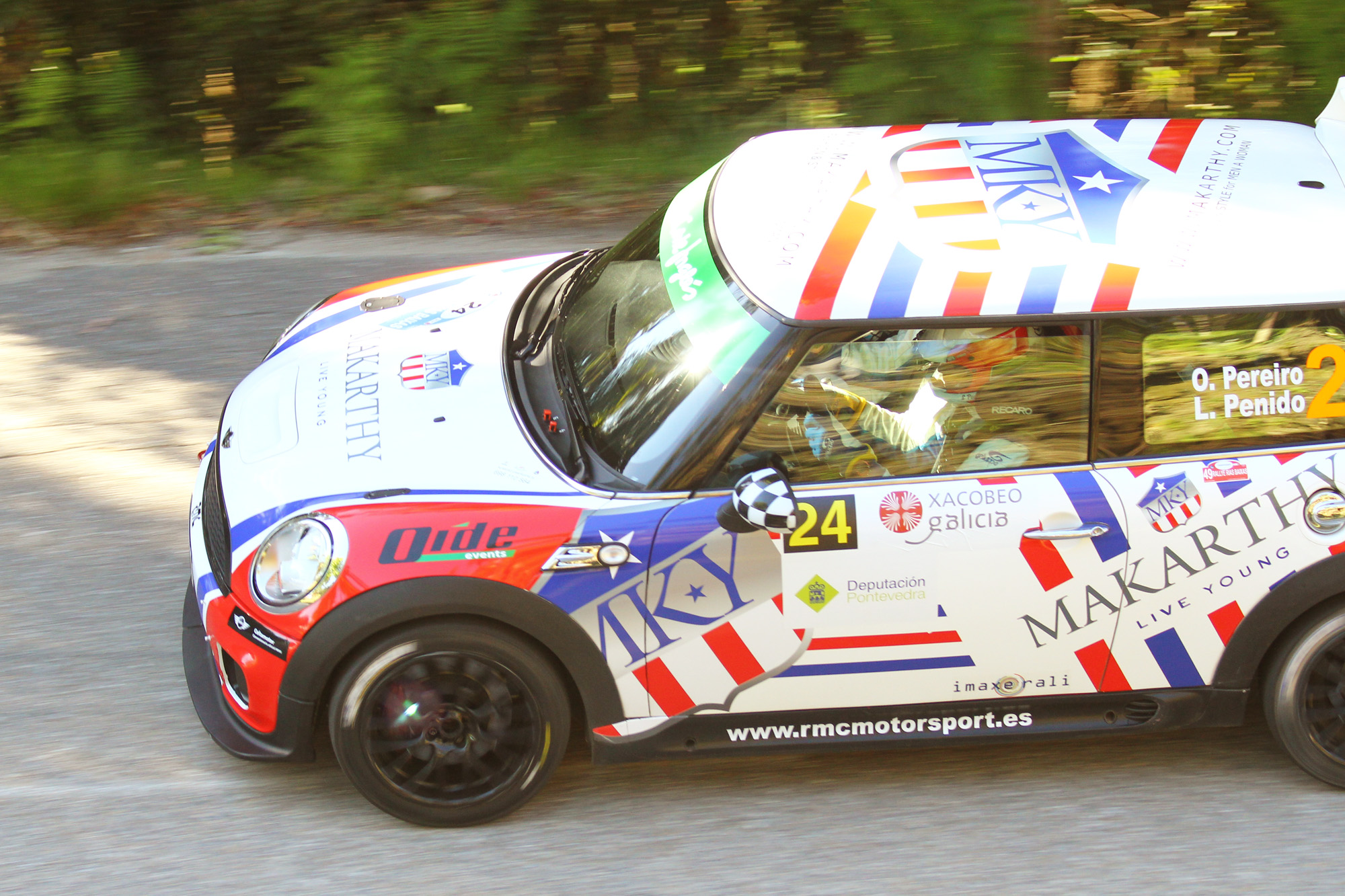 Rally Rias Baixas 2013 (Oscar Pereiro)